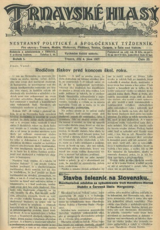 Titulný list periodika Trnavské hlasy z r. 1927.